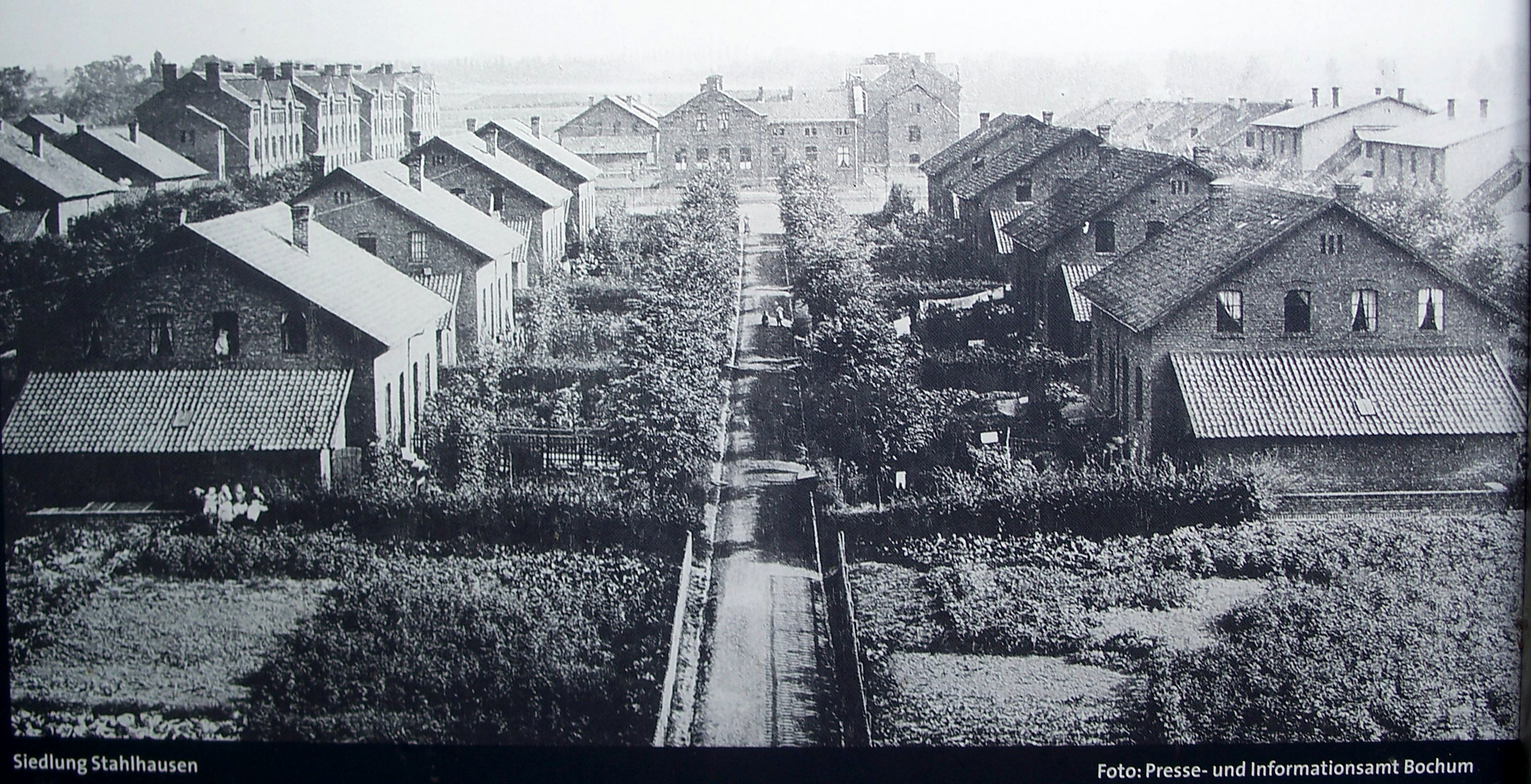 Bild der historischen Siedlung Stahlhausen